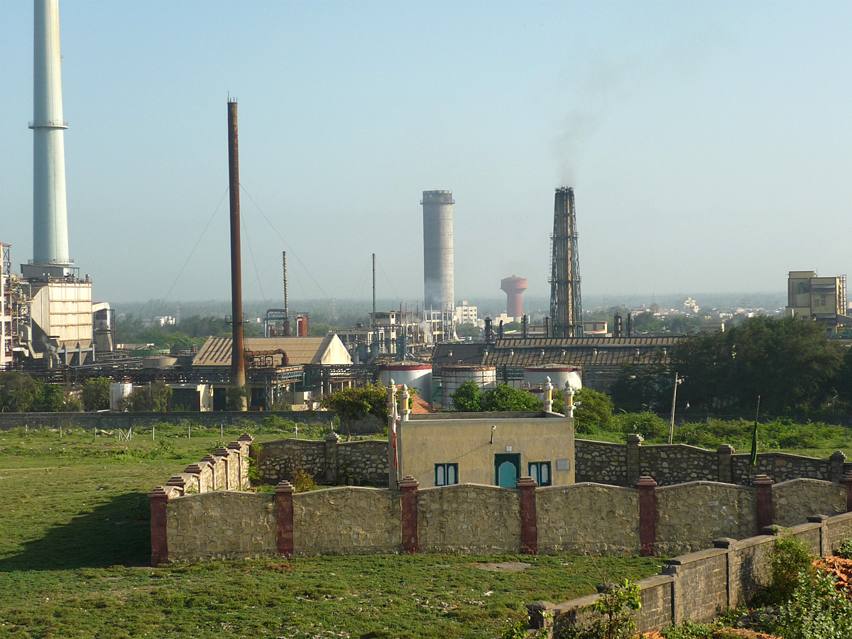 Industrial Complex